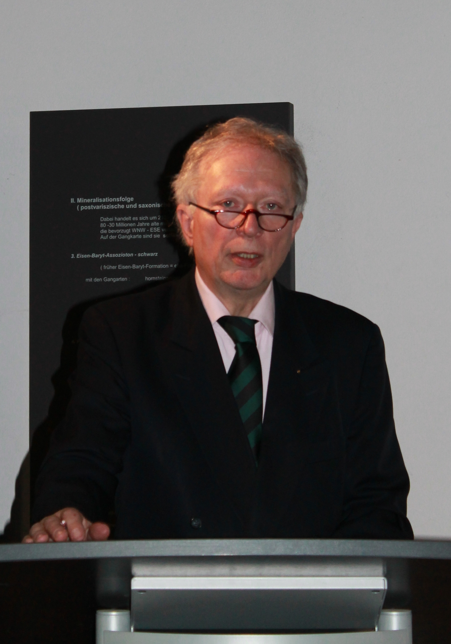 Reinhard Schmidt, sächsischer Oberberghauptmann a.D.